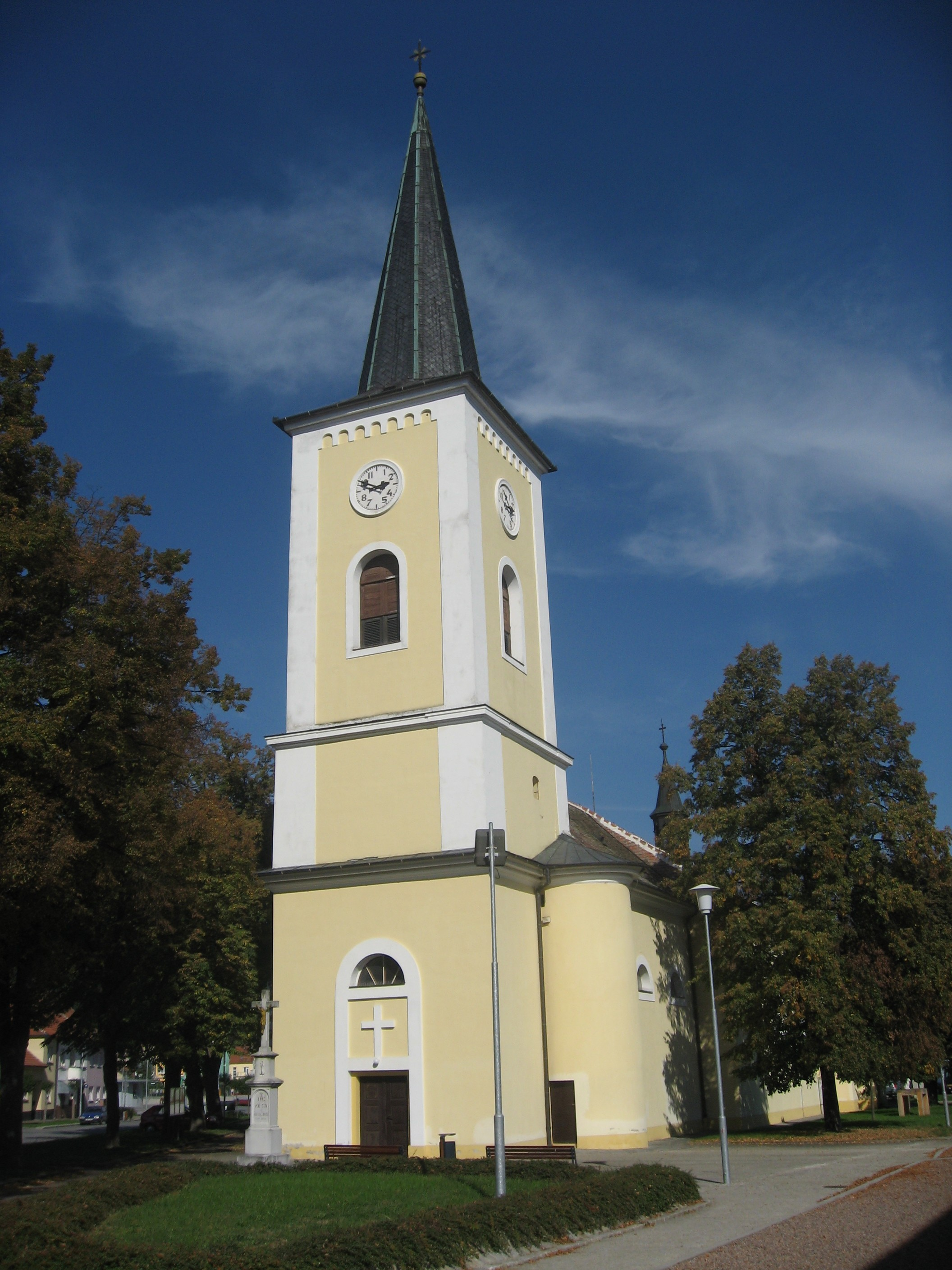 Kostel svatých Janů, Brno-Bystrc